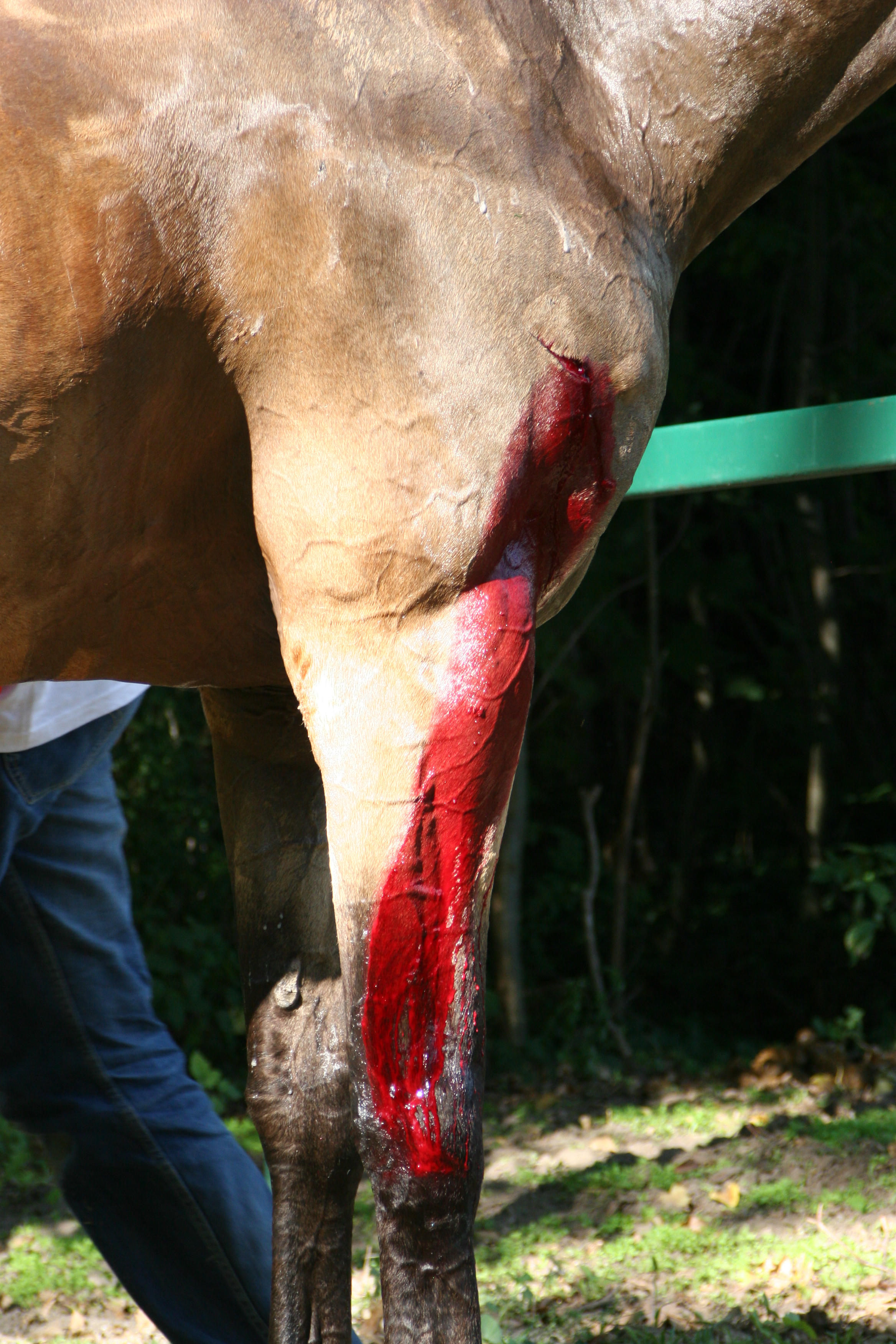 Durch die starke Durchblutung stark blutende Schnittverletzung